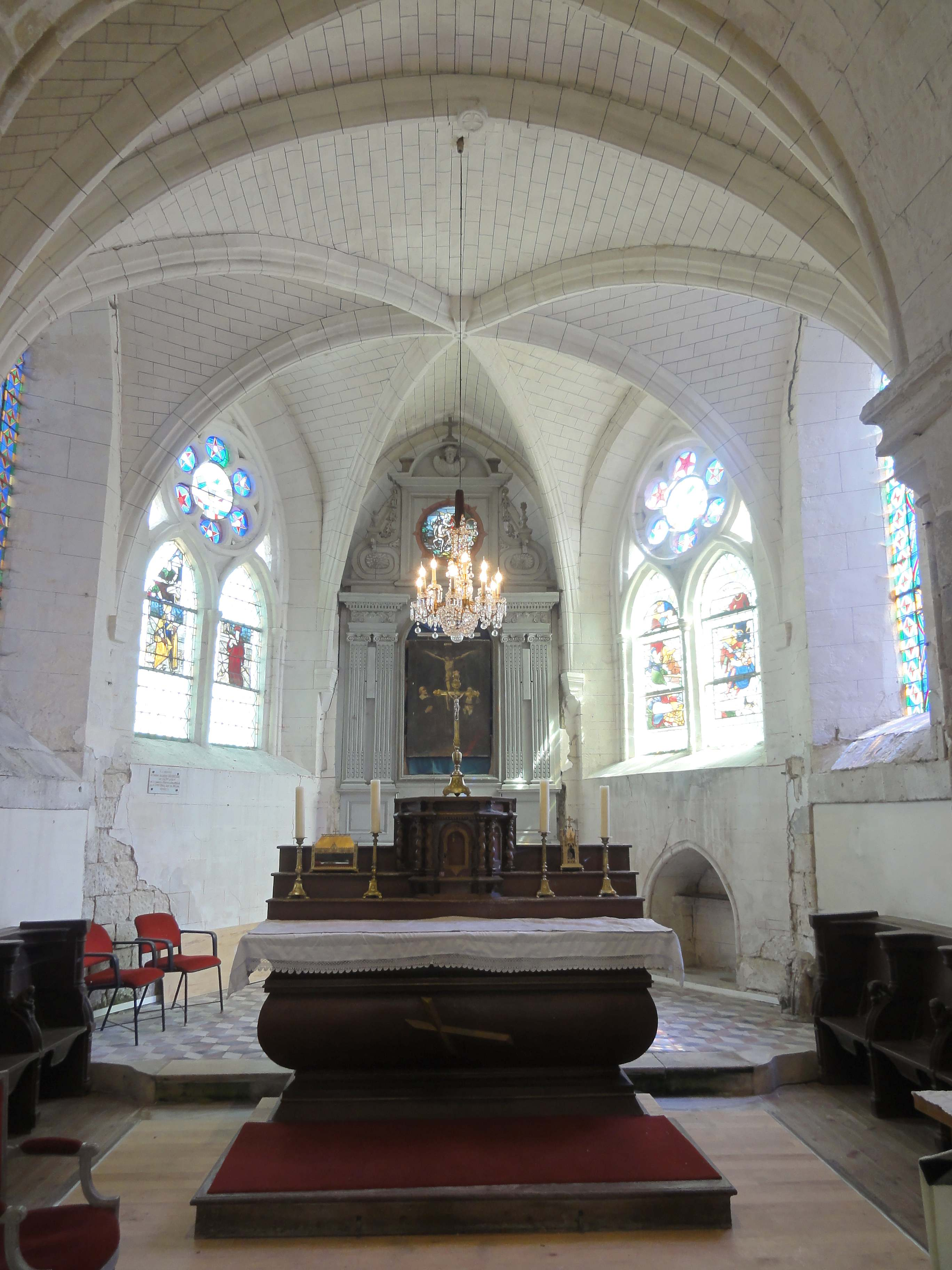 Intérieur de l'église (voir titre).